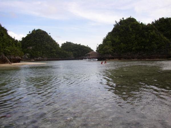 Magsaysay